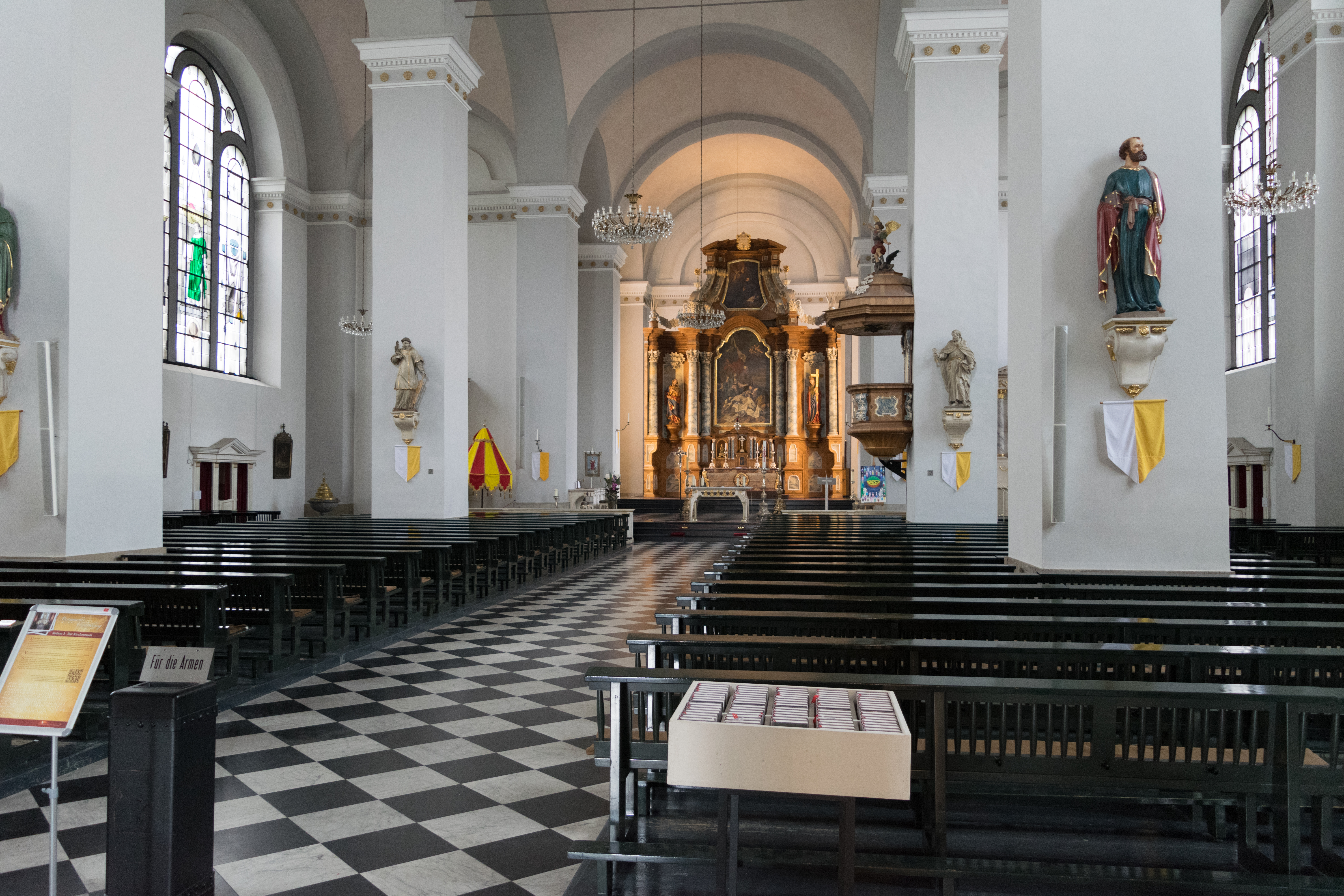 Laurentiusplatz, Wuppertal